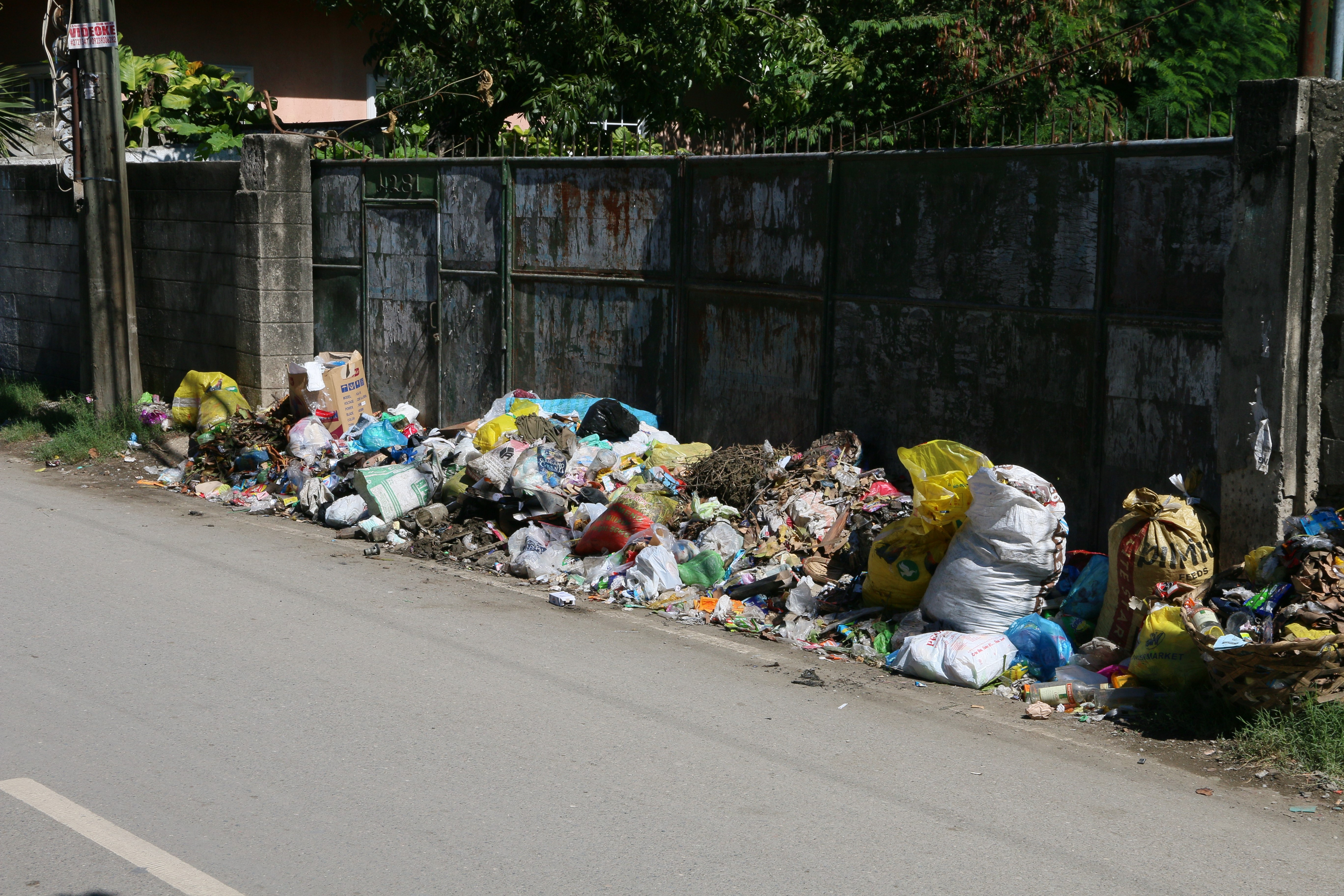 Garbage by a road, Talisay, Cebu